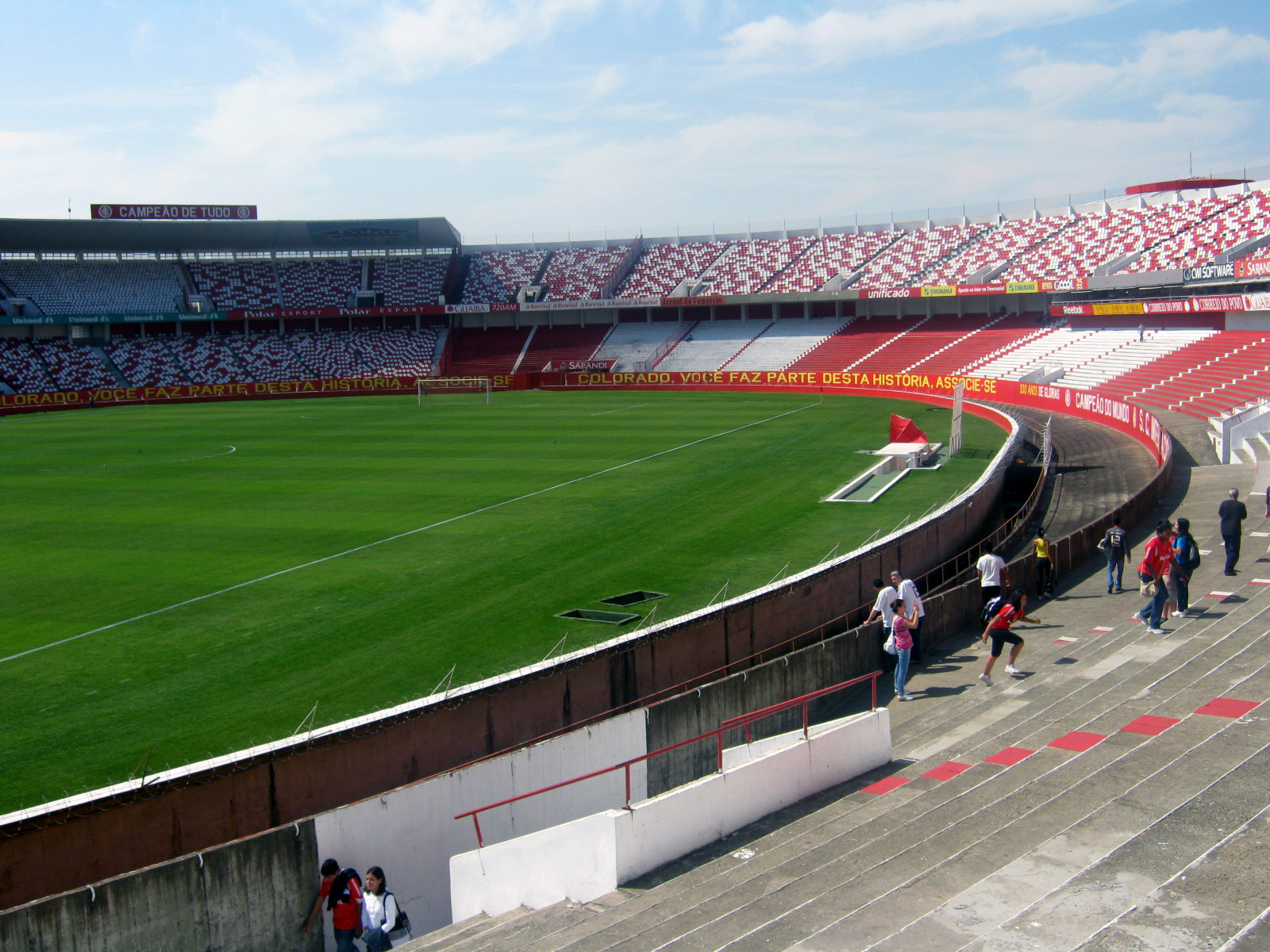 Porto Alegre 02 Internacional stadium (12)